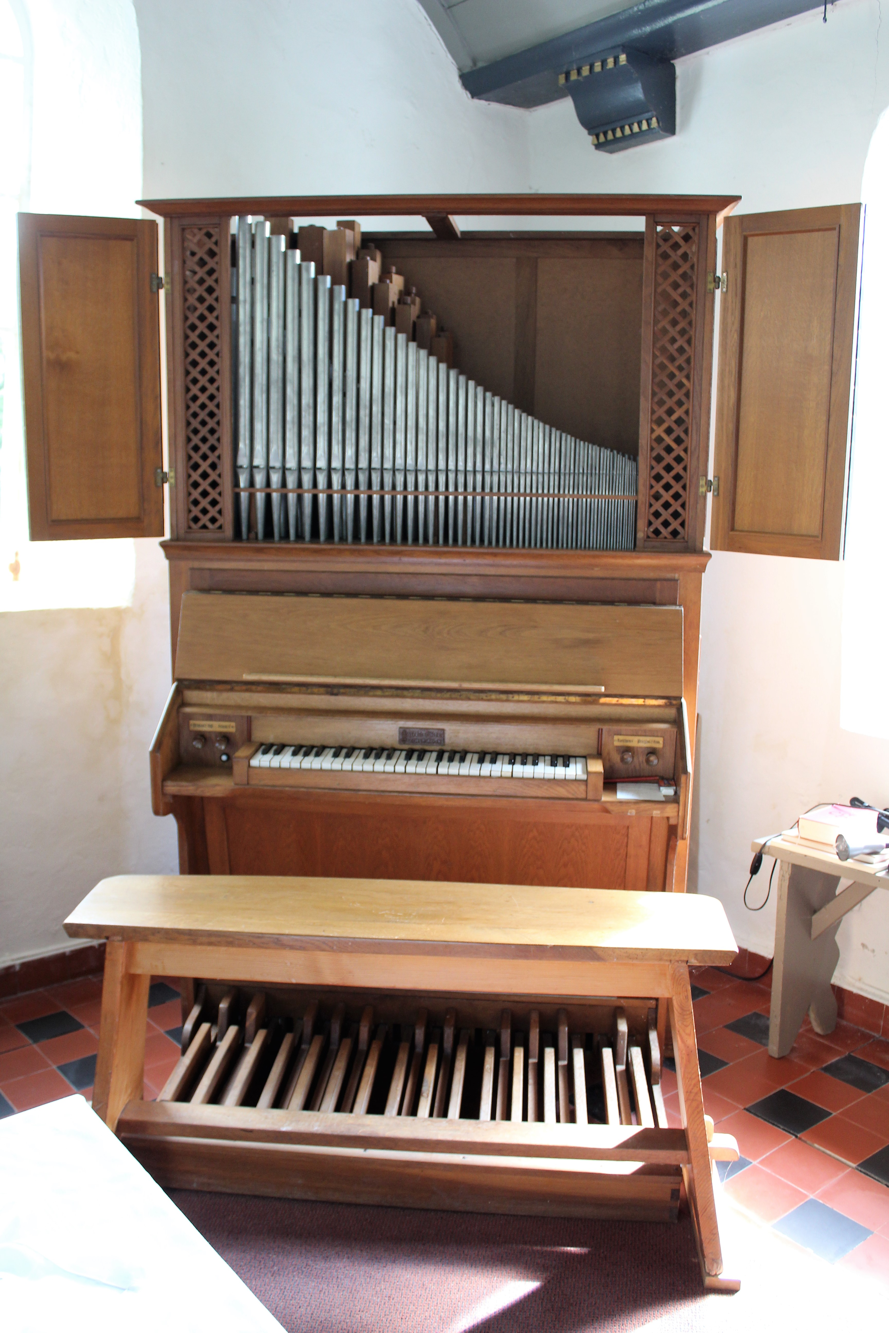 Ev.-reformierte Kirche St. Maria in Marienchor, Gemeinde Jemgum, Landkreis Leer, Ostfriesland, Deutschland